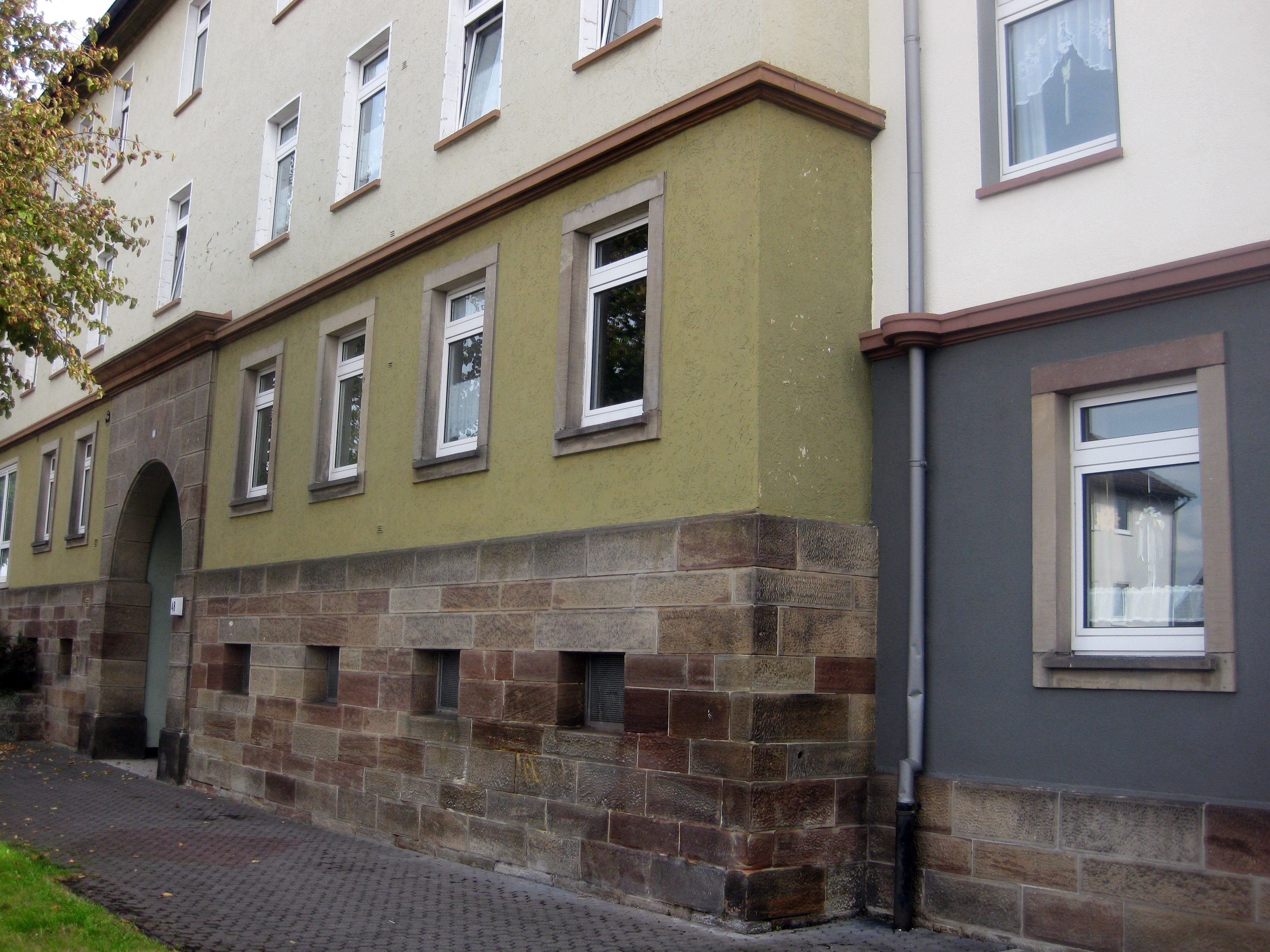 Gebäude in der Siedlung in Lohfelden